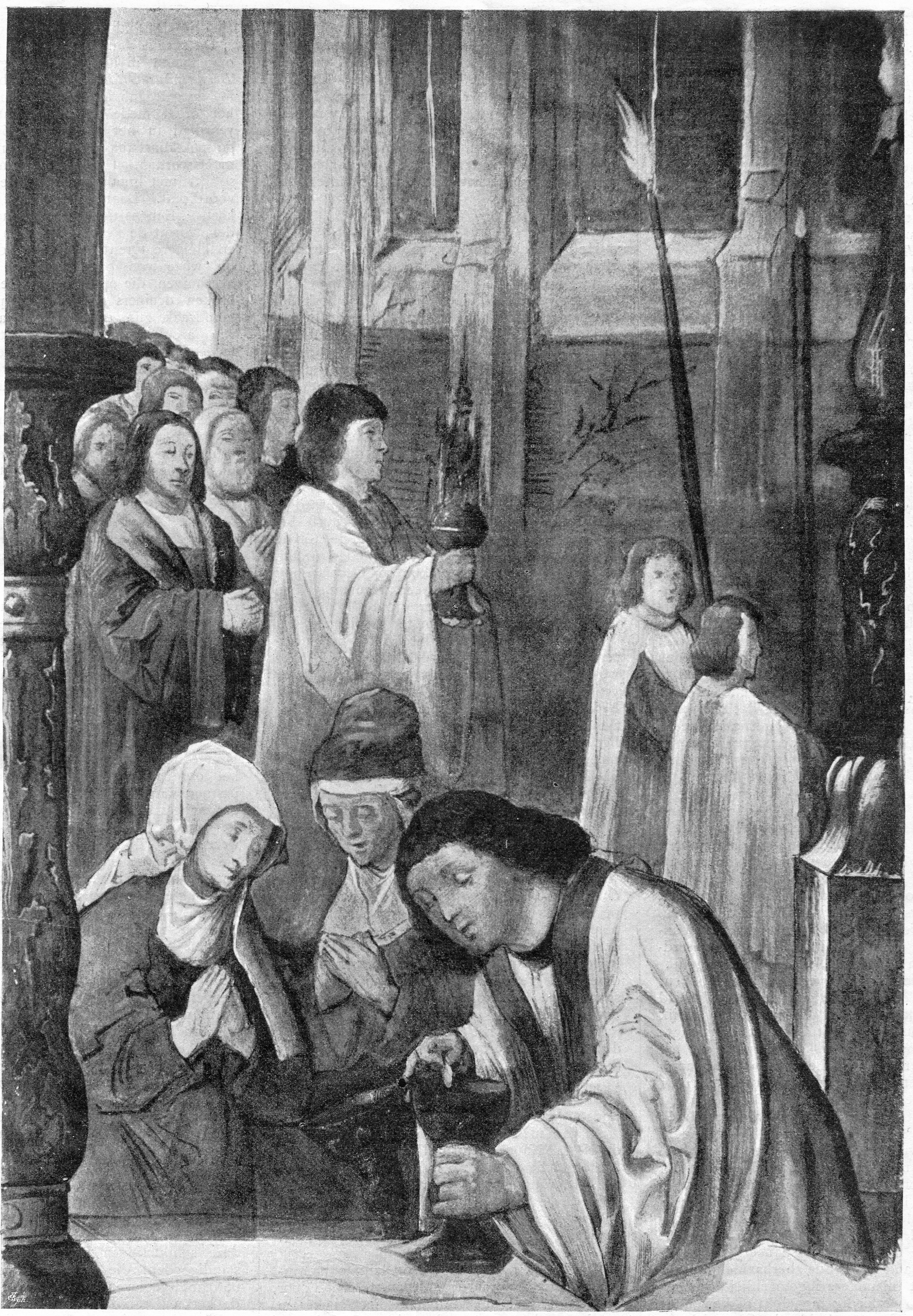 Kath Illustratie 1894 fragment van de oude schilderij in de H. Stede. De miraculeuze hostie wordt, uit het huis van den zieken man, door den priester in processie naar de oude kerk overgebracht.